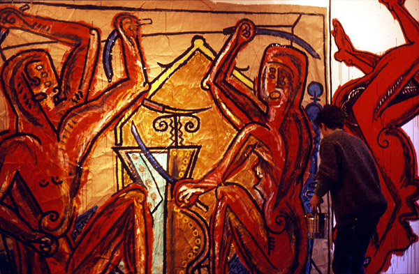 Le peintre Jean Faucheur (Frères Ripoulin) Photo Peinture reproduite avec l'autorisation formelle du peintre Jean Faucheur, pour ce cliché précis et pour la présente encyclopédie.